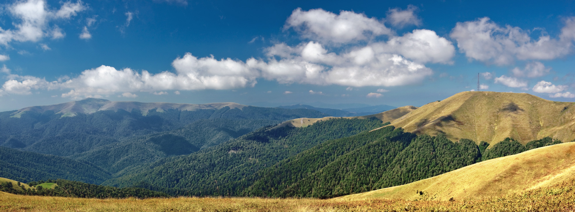 Карпатський біосферний заповідник, Рахівський, Тячівський, Хустський, Виноградівський райони